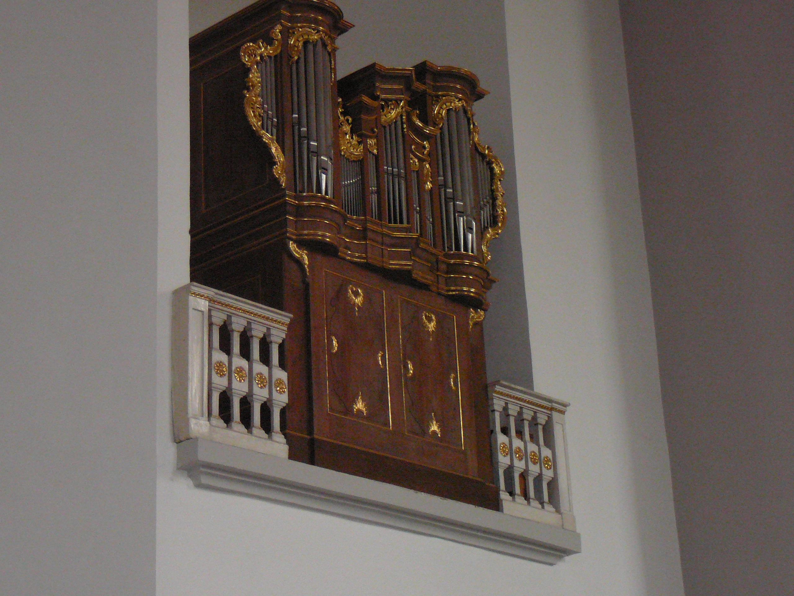 Sankt Laurentius, Friedrich-Ebert-Str. 20, Wuppertal-ElberfeldThis is a photograph of an architectural monument.